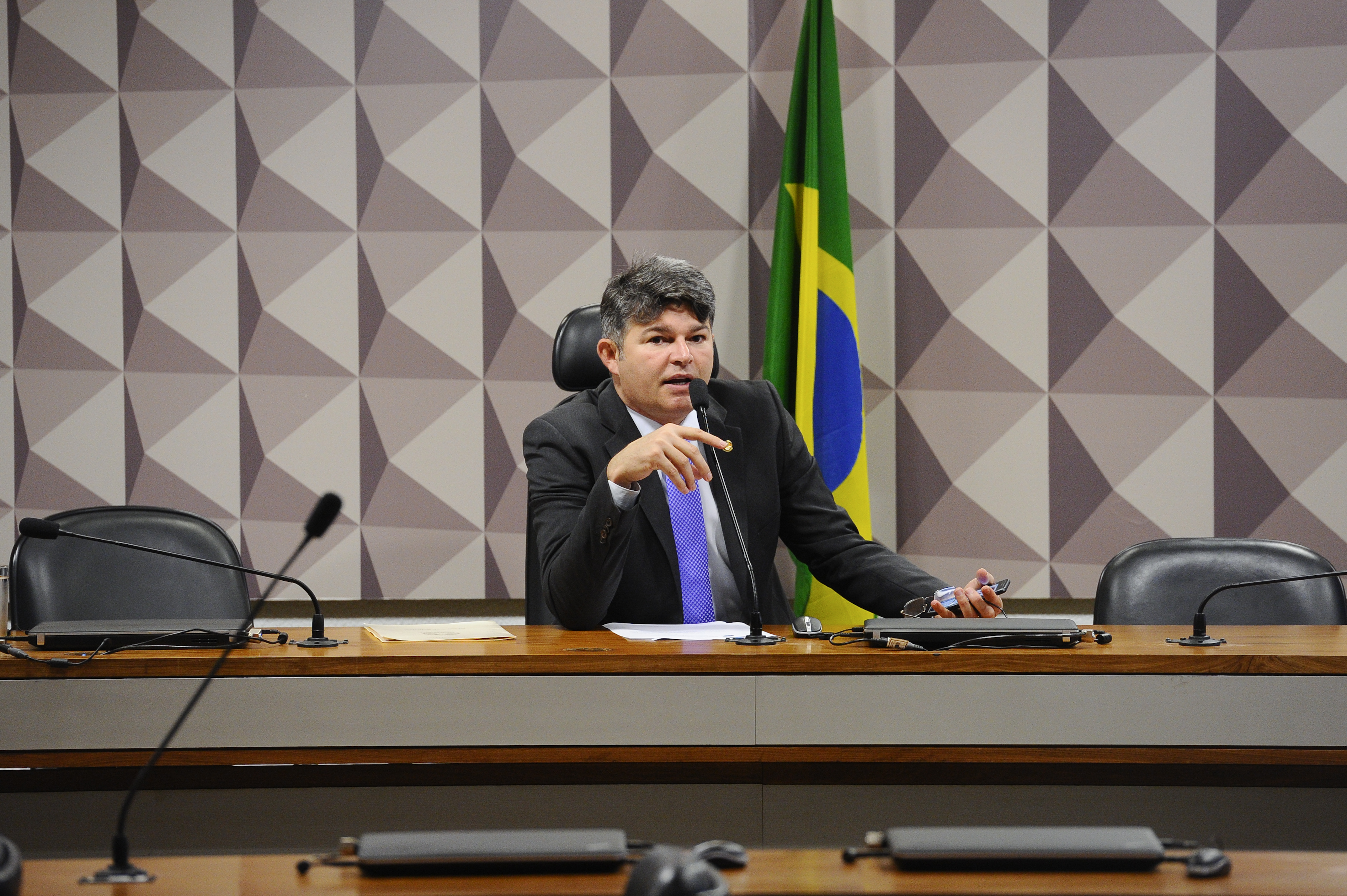 CPI dos Maus-tratos (CPIMT) -Audiência interativa para ouvir depoimentos referentes à exposição "Queermuseu" é adiada. À mesa, relator da CPIMT, senador José Medeiros (Pode-MT). Foto: Marcos Oliveira/Agência Senado